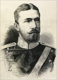 перший правитель незалежної від османського панування Болгарії.